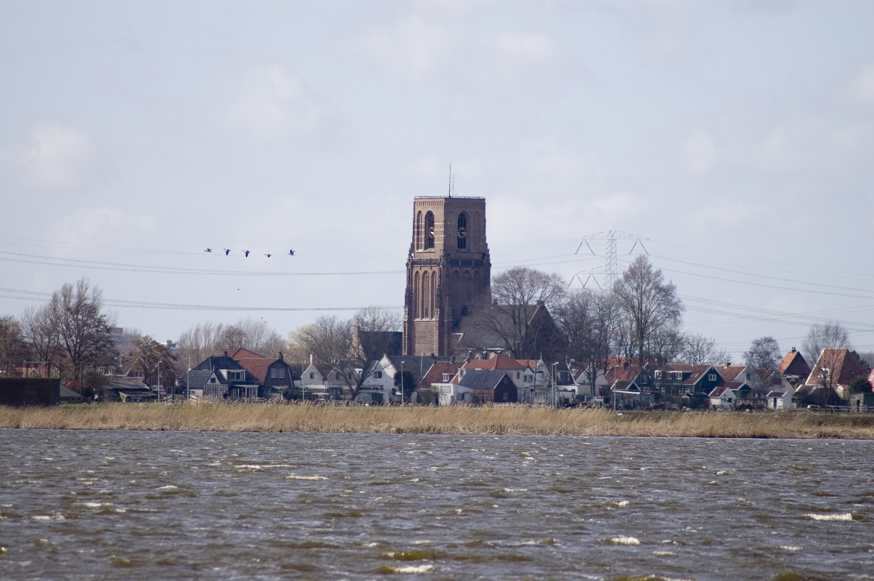 Toren van Ransdorp, gezien over water.